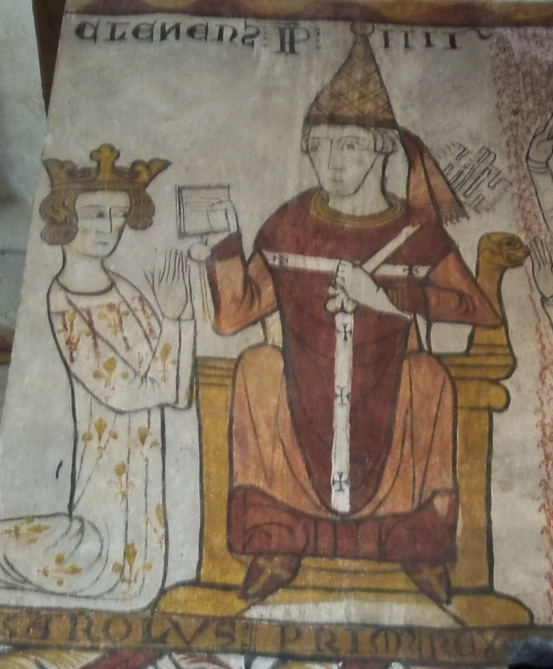 Le Pape Clément IV et Charles d'Anjou (Fresque de la Tour Ferrande à Pernes les Fontaines, Vaucluse, France)